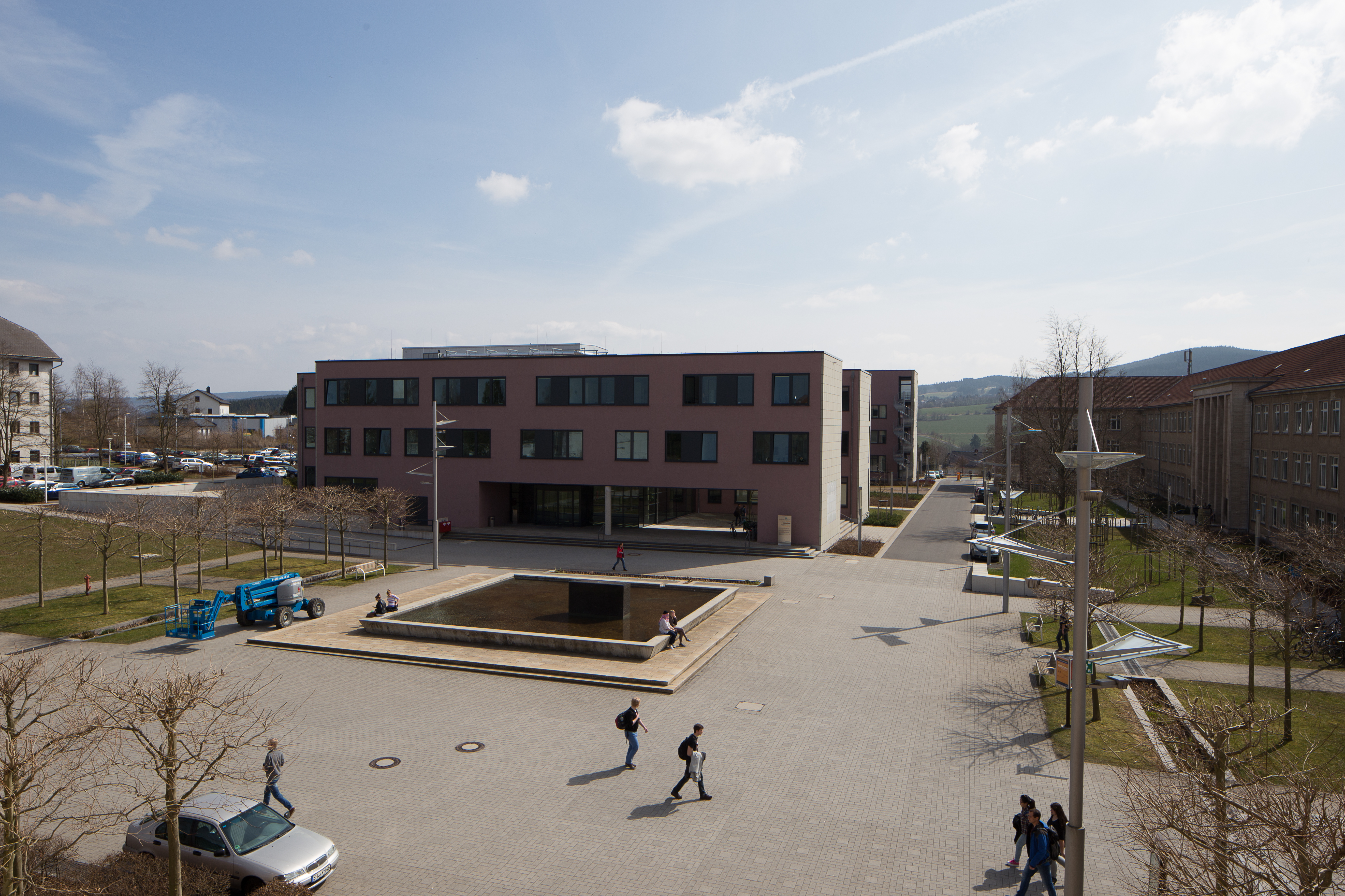 Gustav-Kirchhoff-Platz von Norden, TU Ilmenau